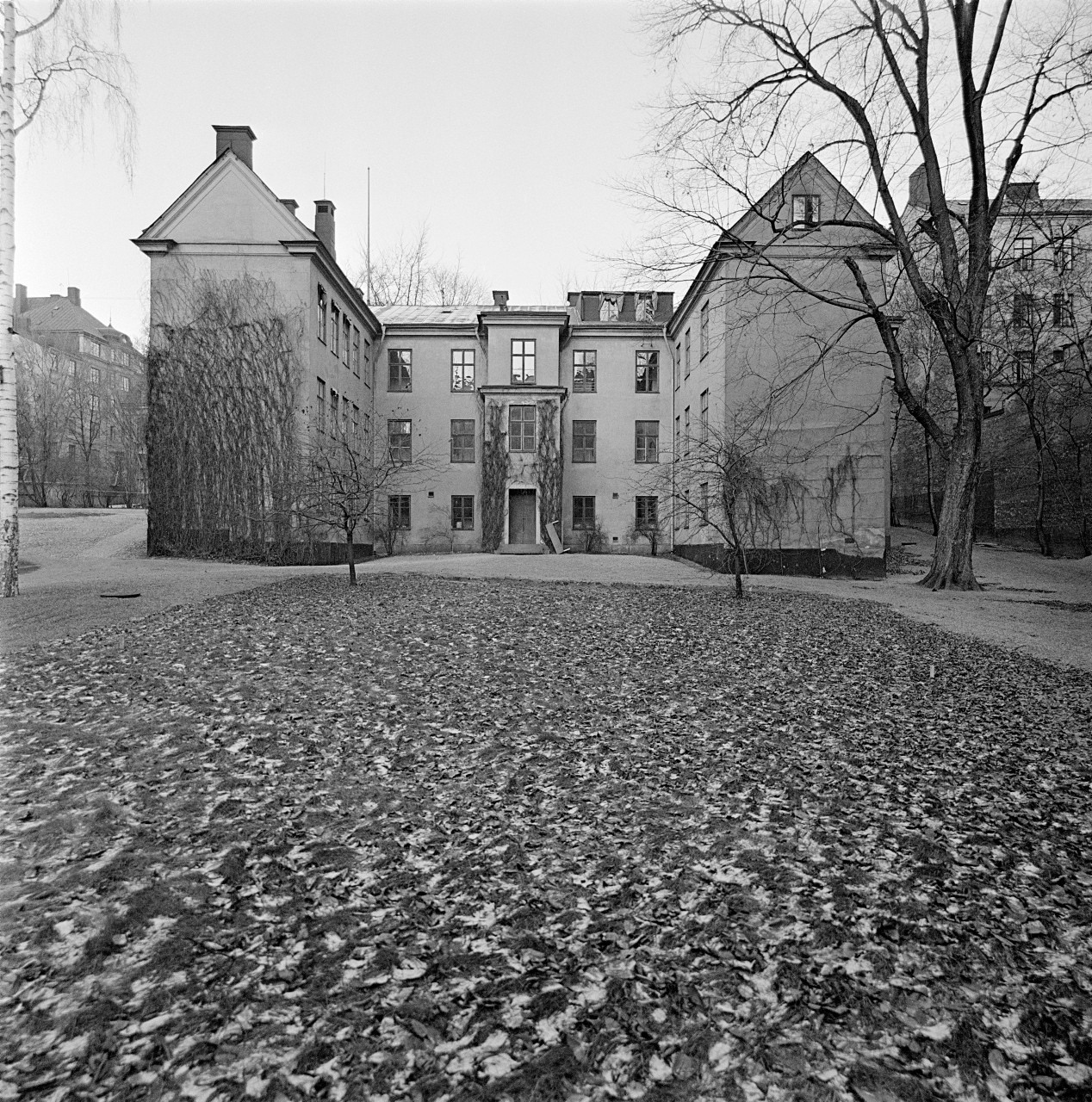 Kurhuset Eira 1955. Stockholms stadsmuseum Fotonummer F 78254